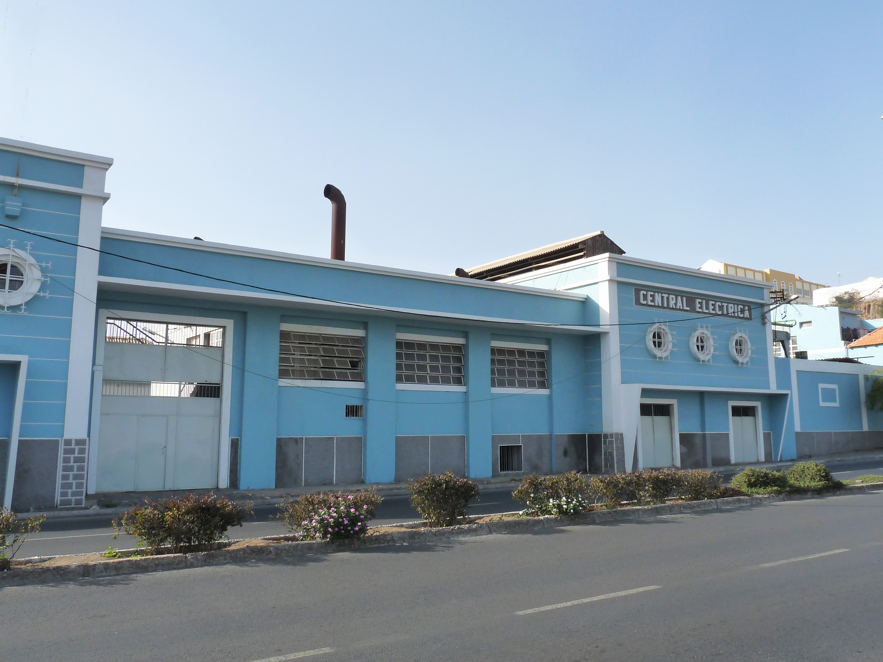 Praia (Cap-Vert) : Central eléctrica de Praia (CEP)